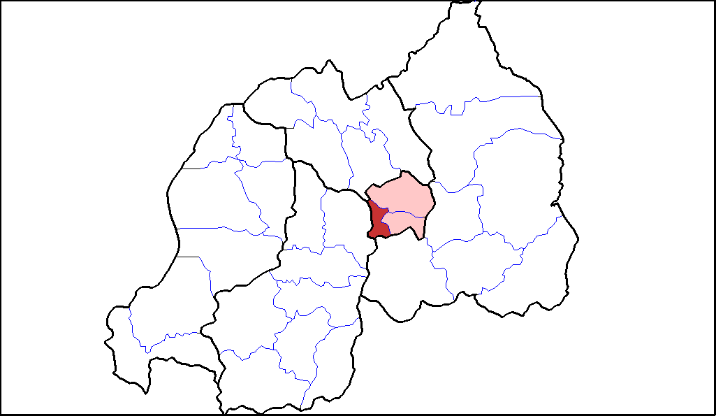 Distretto di Nyarugenge.